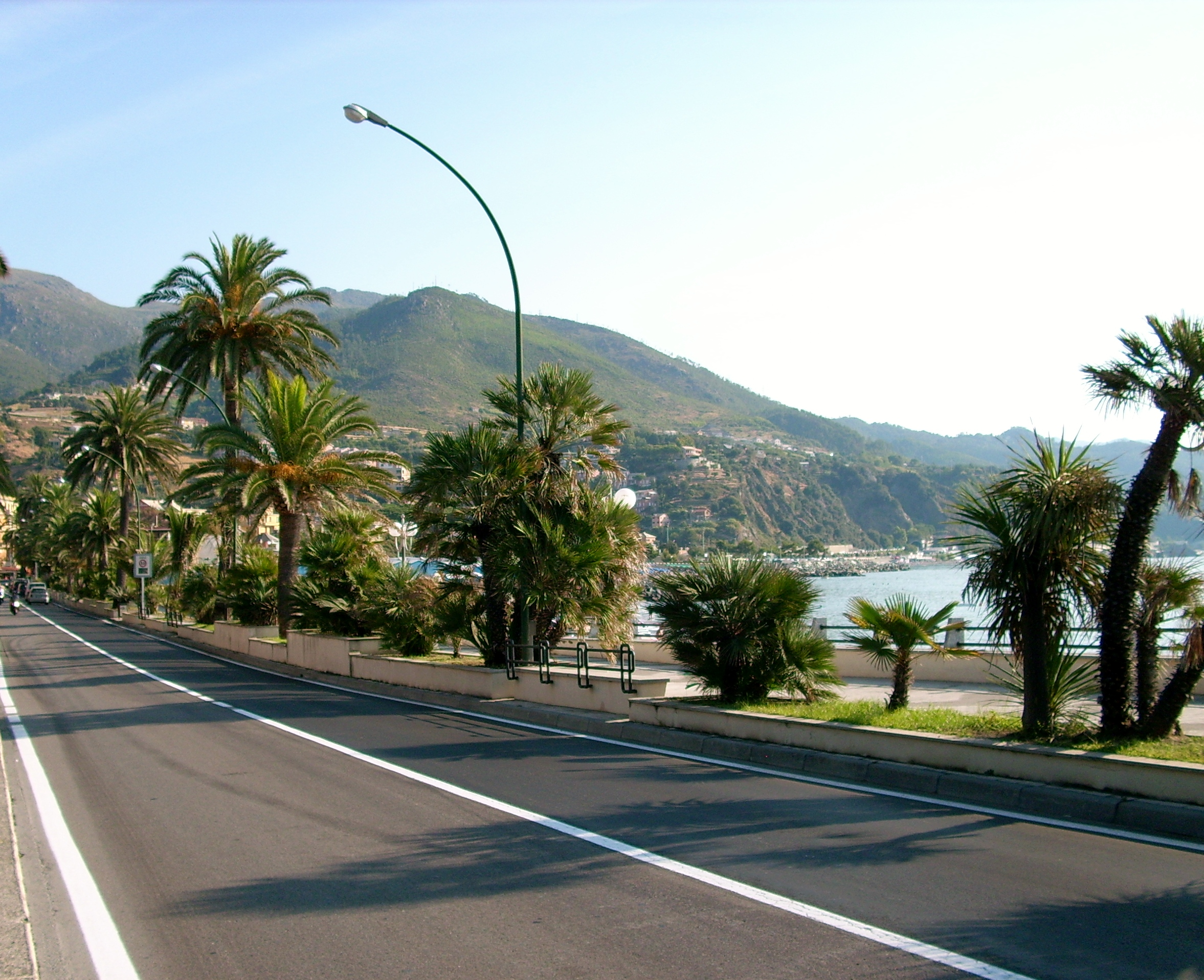 Lungomare di Arenzano, Liguria, Italia